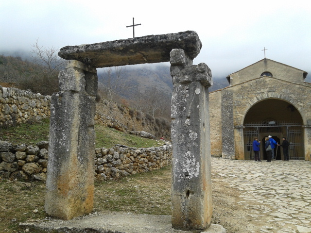 Resti del pronao